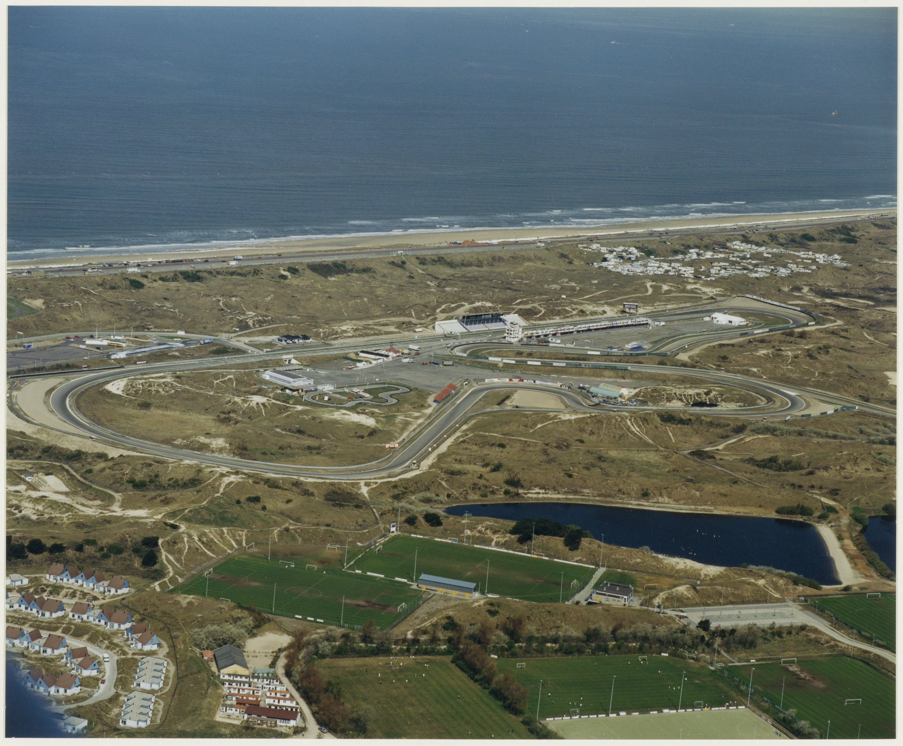 Circuit Zandvoort aangepast aan internationale normen.